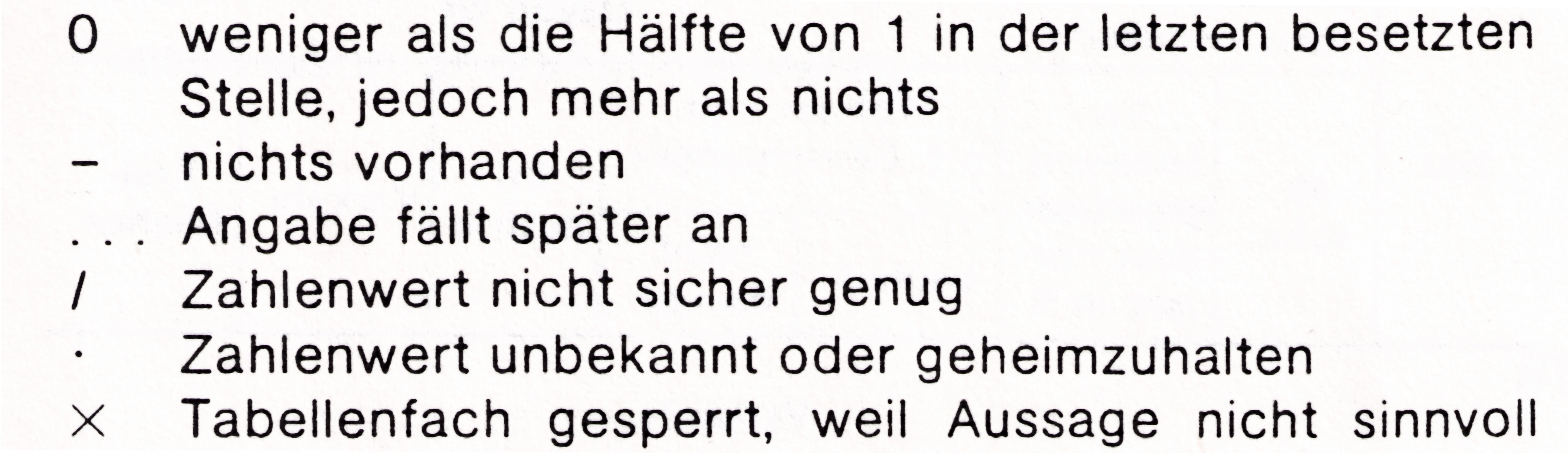 Wert ersetzende Zeichen in statistischen Tabellen